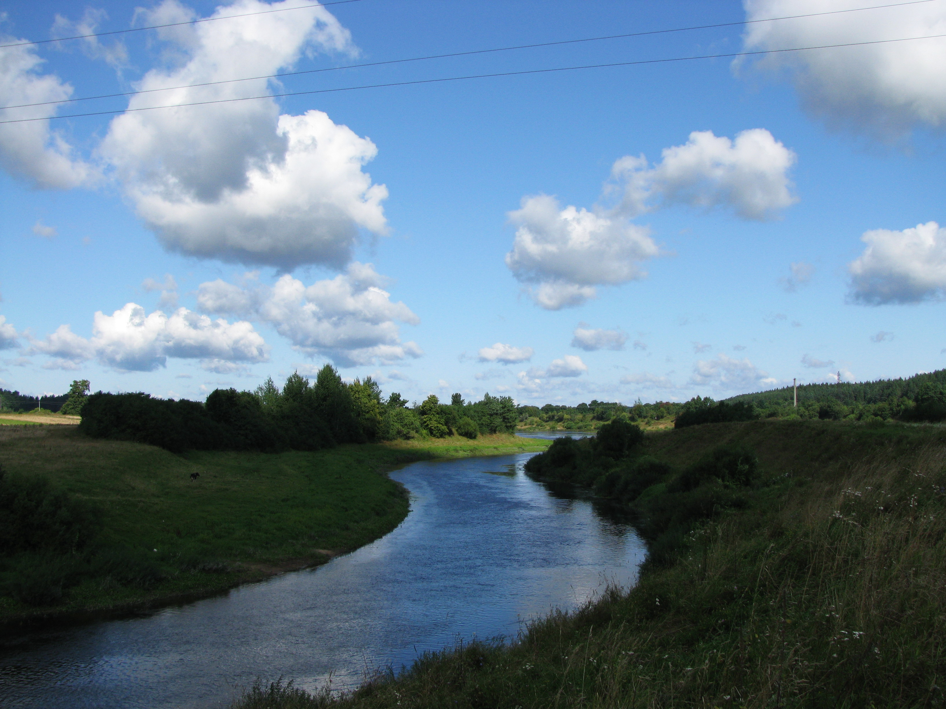 река Улла